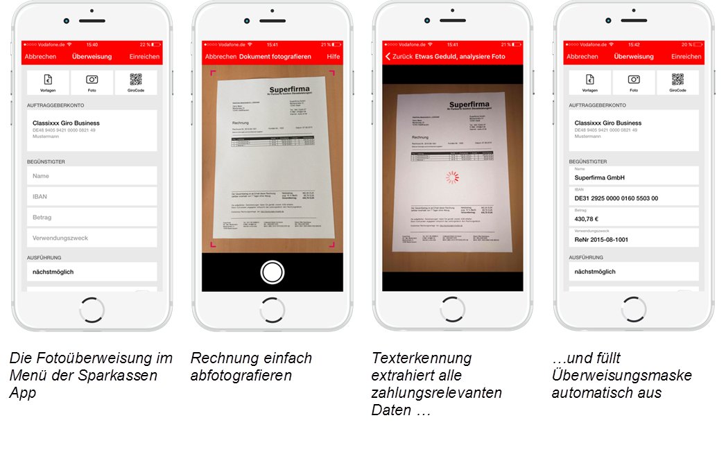 Die einzelnen Schritte einer Fotoueberweisung - beispielhaft gezeigt am Beispiel der Sparkassen-App